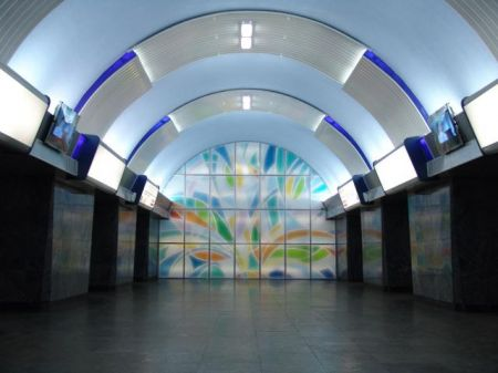 Tbilisi metro renovation program